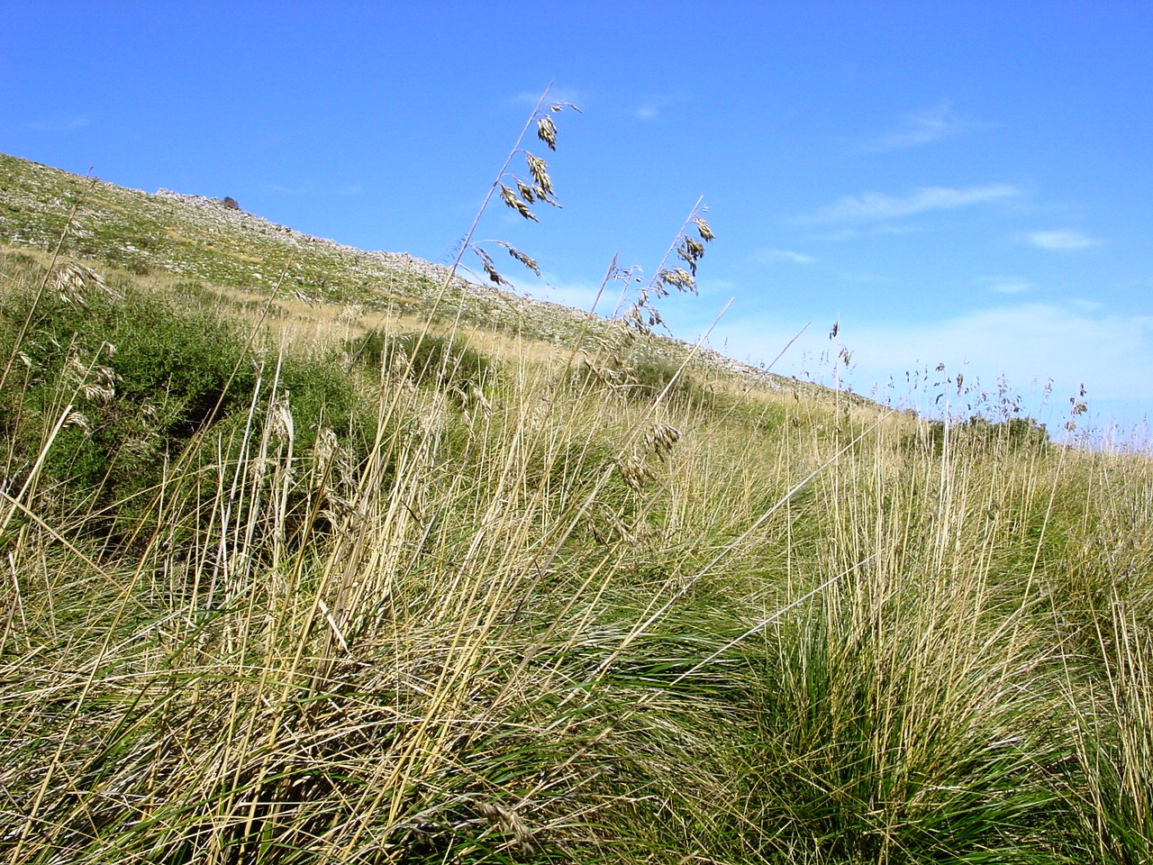 Riserva naturale dello Zingaro, Sicily Ampelodesmos mauritanicus